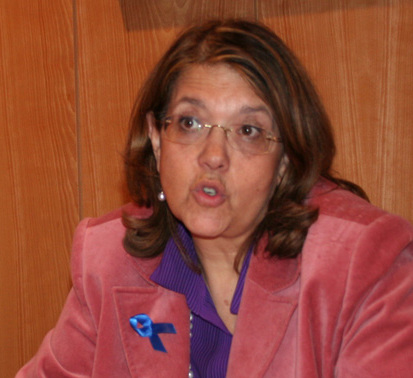 Elvira Rodríguez is a politician from Spain. She belongs to the Partido Popular.